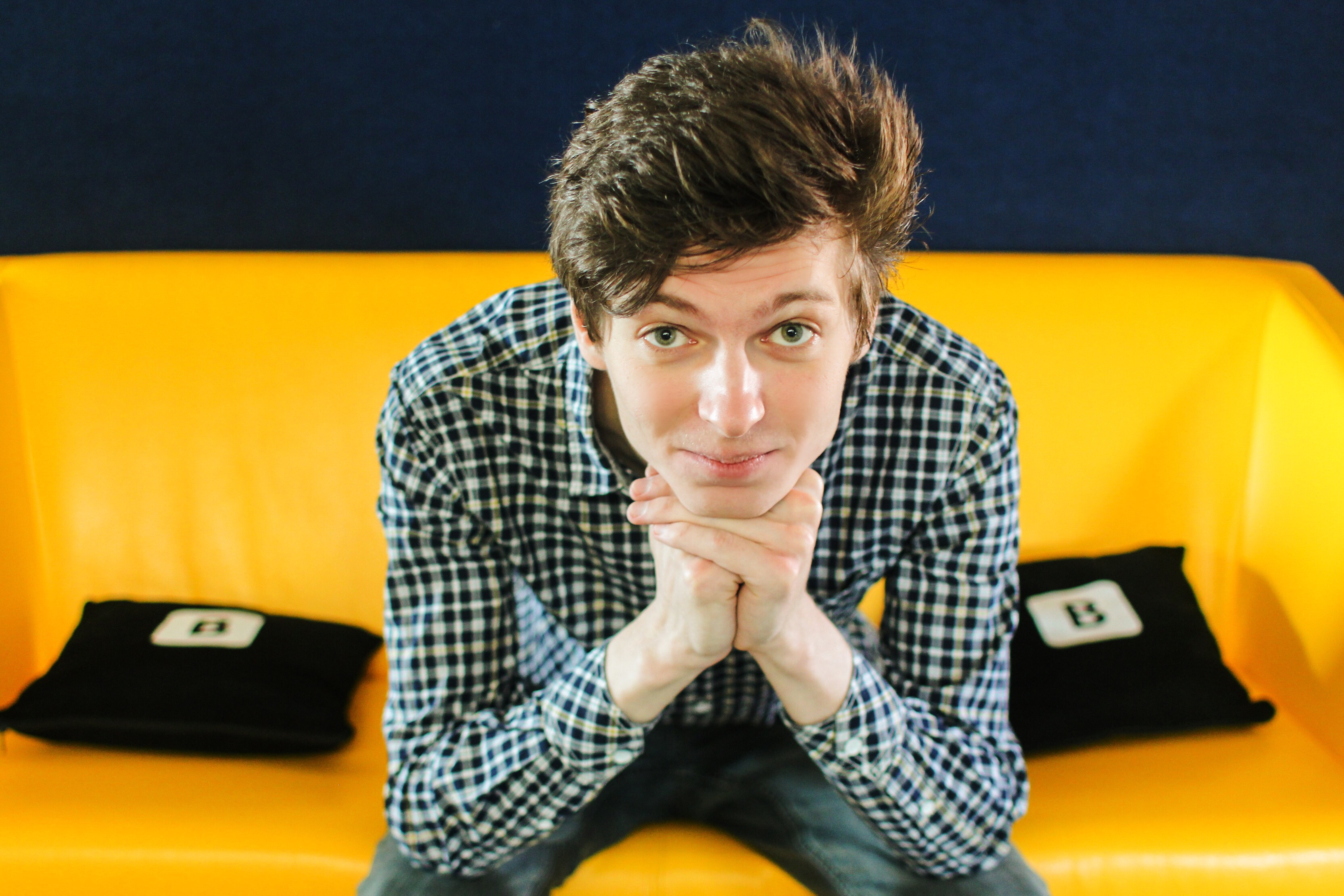 Влад Леготкін, прес-секретар ВКонтакті в Україні